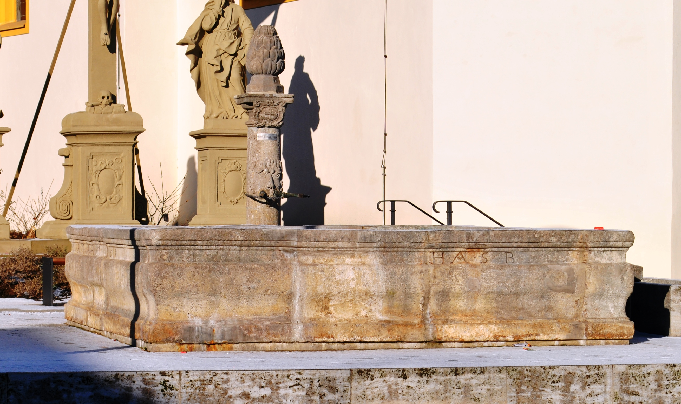 Dorfbrunnen Becken mit geschweifter Brüstung und umlaufender Mauerbank zum Abstellen von Wassergefäßen, in der Mitte Säule für zwei Röhren, mit Maske und Schild ornamentiert, Rokokoanlage, Mitte des 18. Jahrhunderts D-6-75-174-200